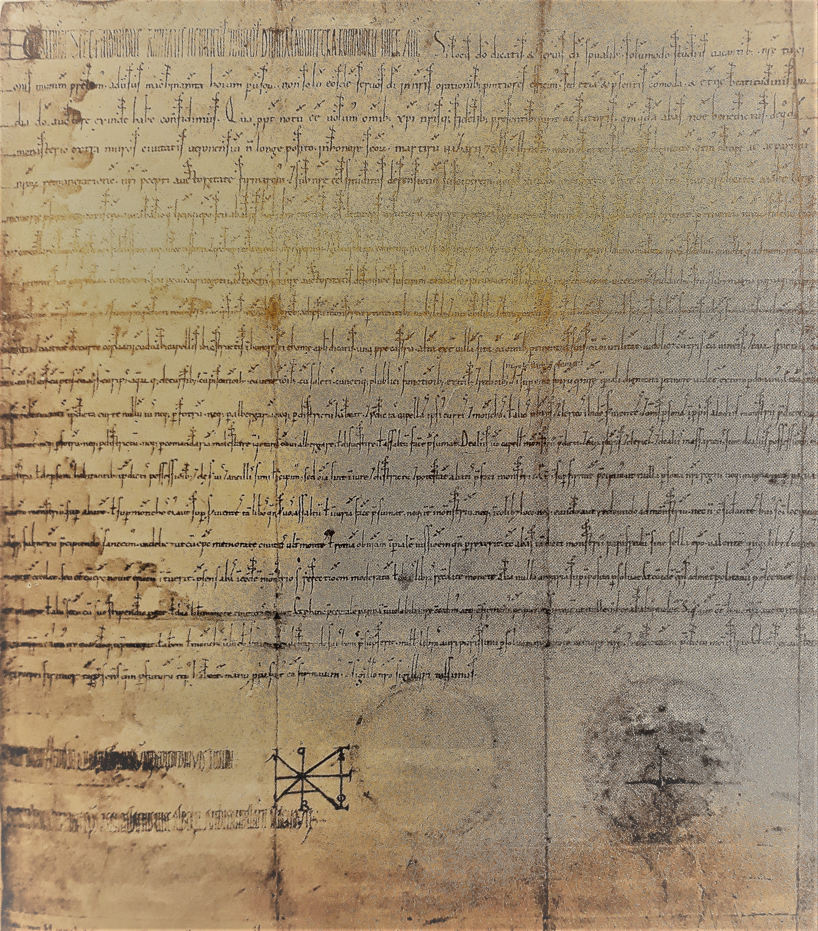 Diploma dell'imperatore Enrico V del 25 maggio 1111